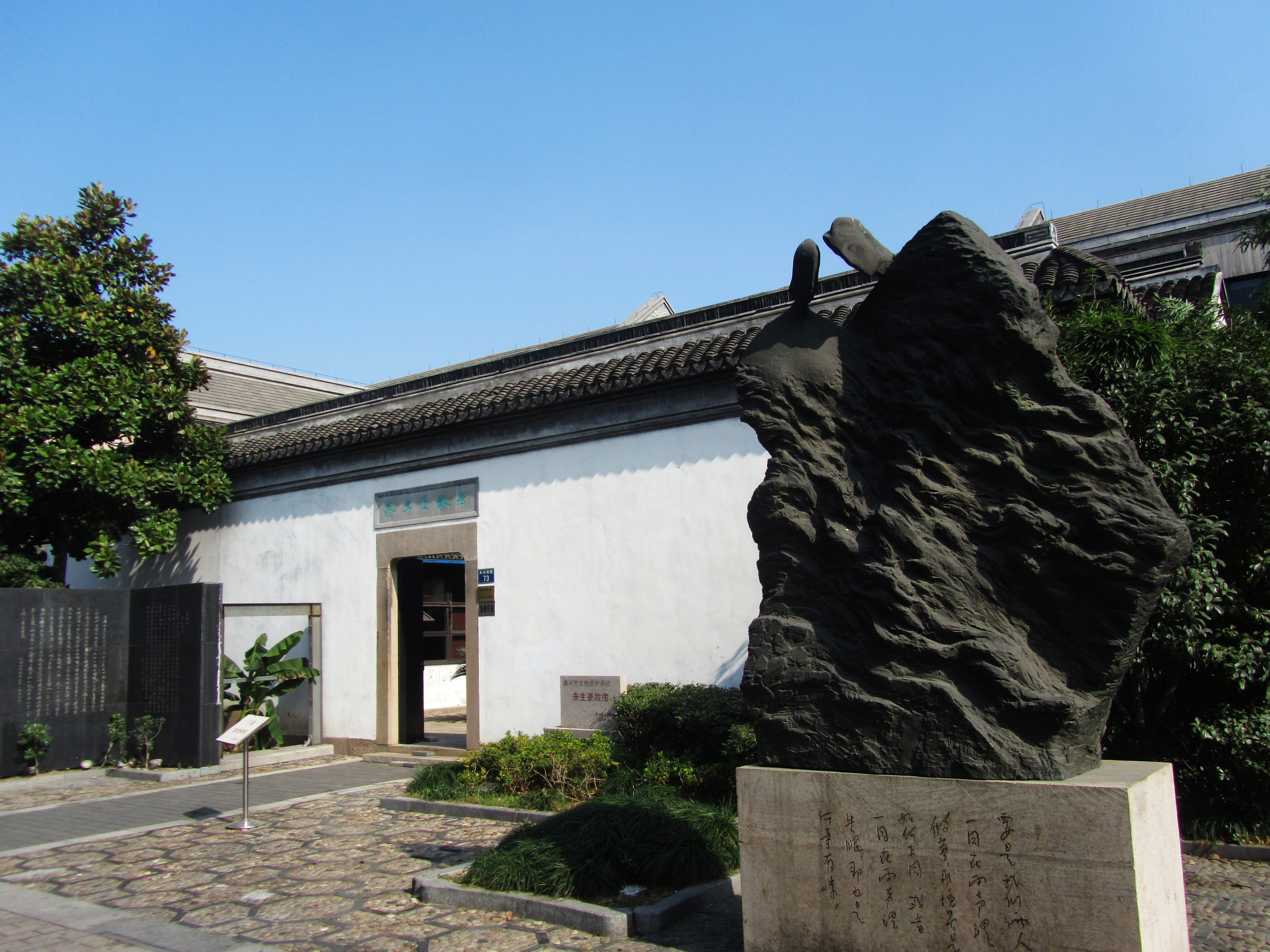 嘉兴朱生豪故居，大门（坐东向西）及朱生豪夫妇像。